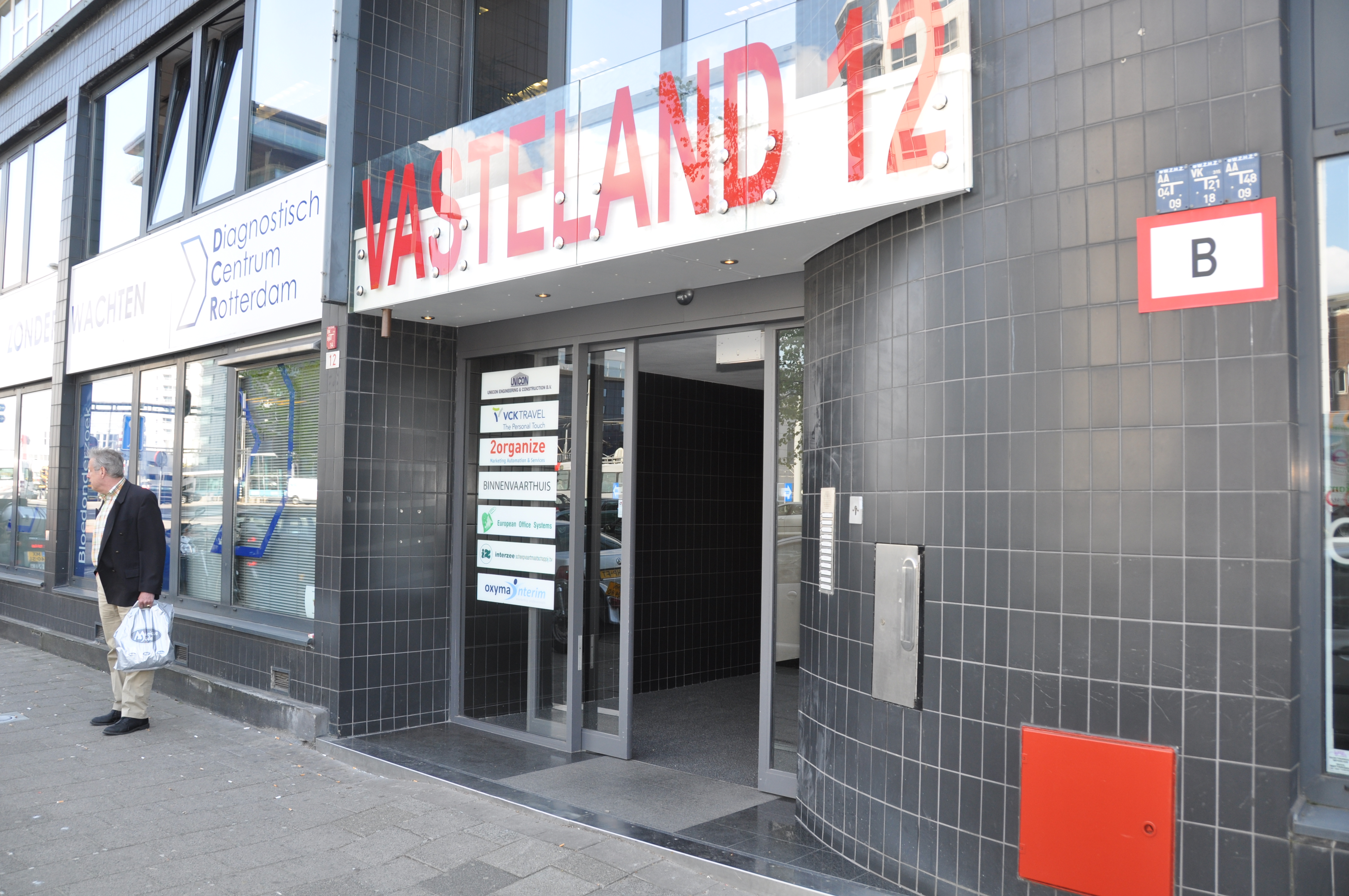 De voordeur van het kantoorgebouw aan Vasteland 12 in Rotterdam in 2010, waar toen het Binnenvaarthuis gevestigd was.